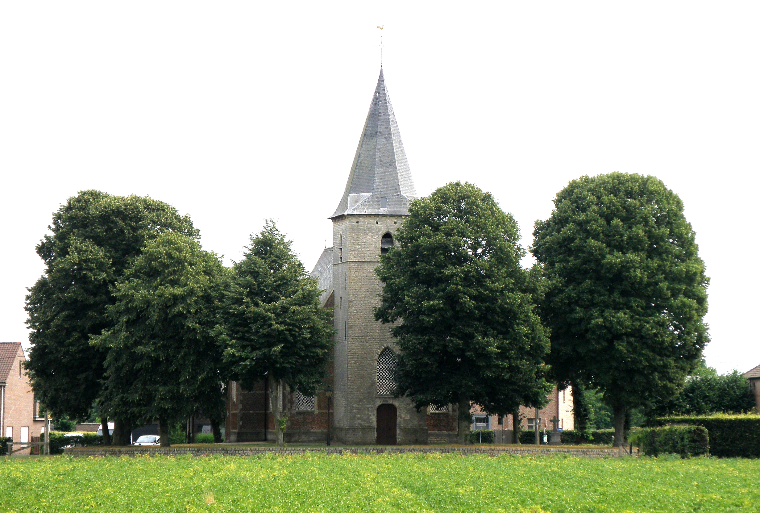 Ranst (prov. Antwerpen, België). Kapel Onze-Lieve-Vrouw-ten-Hemel-Opgenomen (17de en 18de eeuw), in het gehucht Millegem.